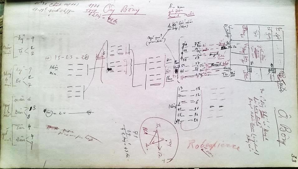 HLNVBong